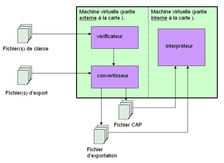 javacard JCVM